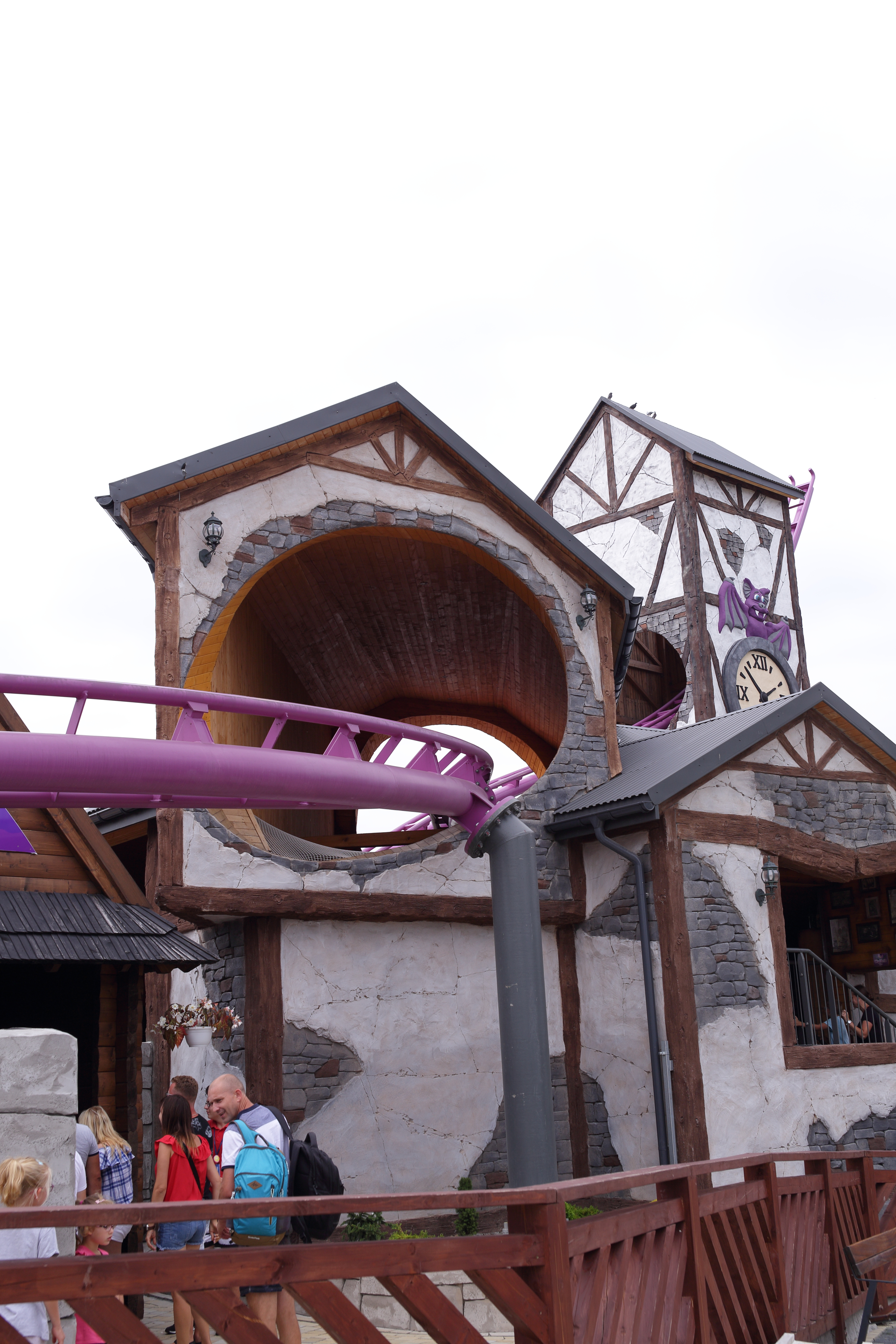 Tunel kolejki Boomerang w parku Energylandia w Zatorze.